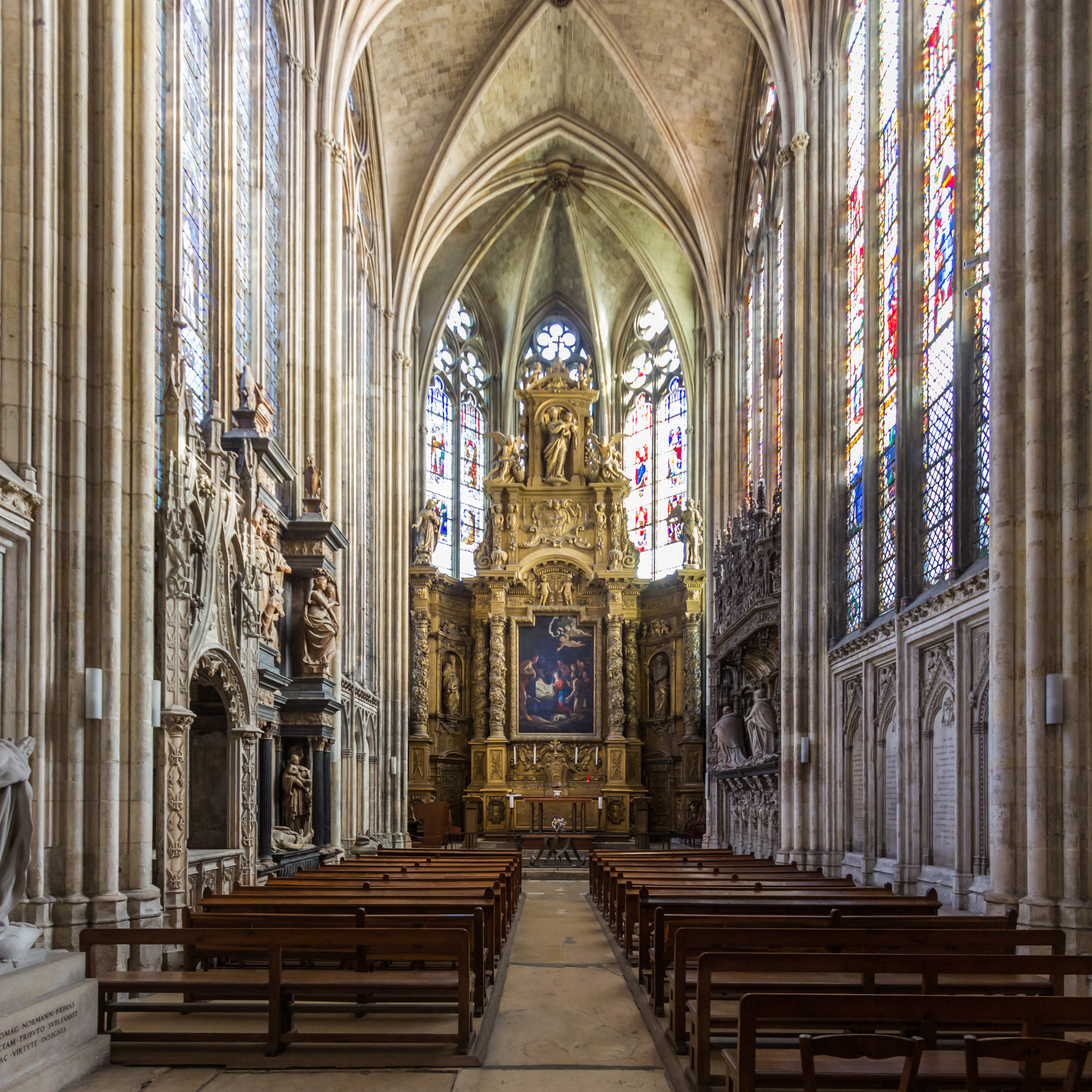 Chapelle de la Vierge, Cathédrale Notre-Dame de Rouen